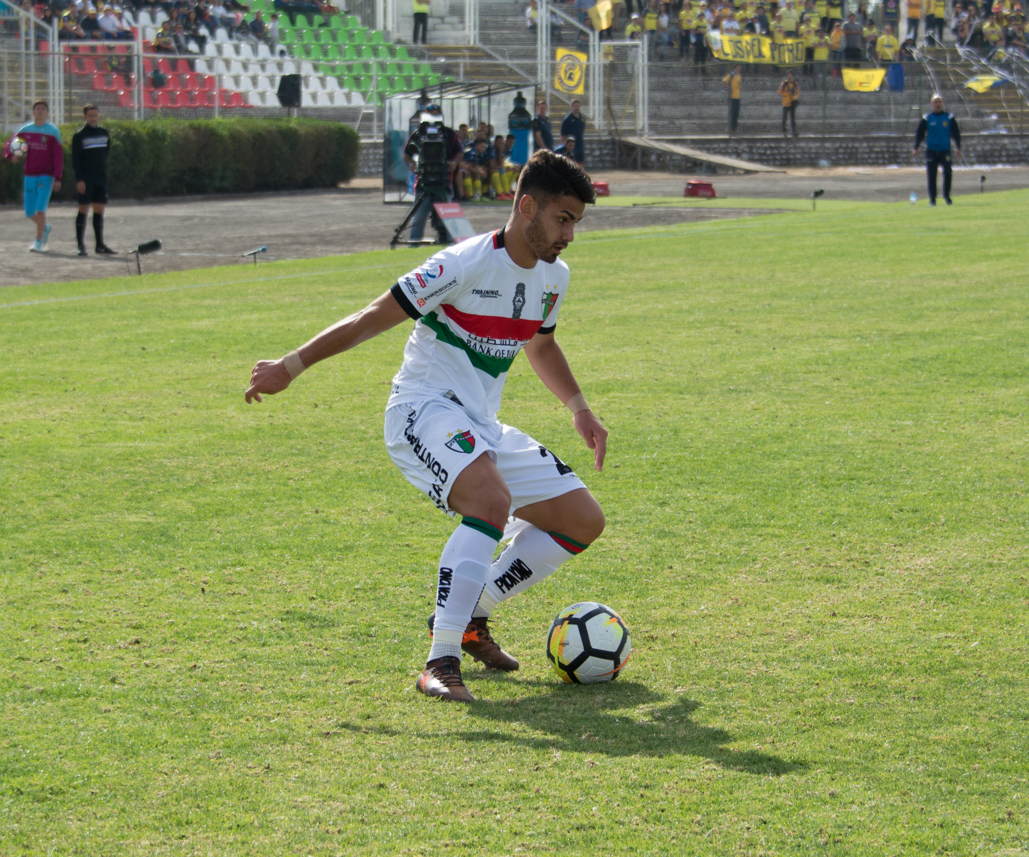 Ignacio Ayala, Palestino v Universidad de Concepción, Estadio Municipal de La Cisterna, La Cisterna, Santiago, Chile.